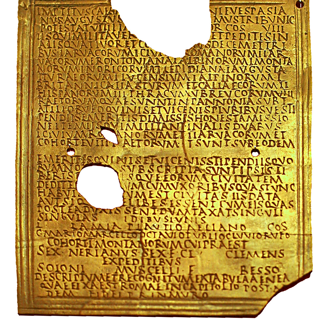 Stattha1ter; T. Atilius Rufus - Titus - iis, qui militaverunt equi[te]s et pedites in alis quattu- or et cohortibus decem et tribus I Arvocorum, I civium Romonorum, II Arvocorum, Frontoniana I Alpinorum, I Montanorum, I Noricorum, l Lepidiana, I Augusta Ituroeorum, I Lucensium, I Alpinorum, I Britonnico, II Asturum et Colloecorum, II Hisponarum, III Throcum, V Breucorum, VIII Roetorum, quae sunt in Pannonia sub T. Atelio Rufo, quinis et vicenis pluribusve spendiis emeritis dsmissis honesto missio- ne, item iis, qui militant in alis duabus I civium Romonorum et II Avacorum et cohorte VIII Raetorum, et sunt sub eodem, emeritis quinis et vicenis stipendiis, quorum nomina subscrip- to sunt, ipsis liberis posterisque eorum civitatem dedit et conubium cum uxoribus - cohort(is) I Montanorum, cui pra(e)est Sex. Nerianus Sex. f(ilius) Clu(stumina) Clemens, ex peditibus Soioni Muscelli f(ilio), Besso -. Datierung: 13. Juni 80 n. Chr. Fundort: Klosterneuburg